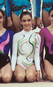 Rosabel Espinosa en el Gimnasio Moscardó (Madrid) en 1991.